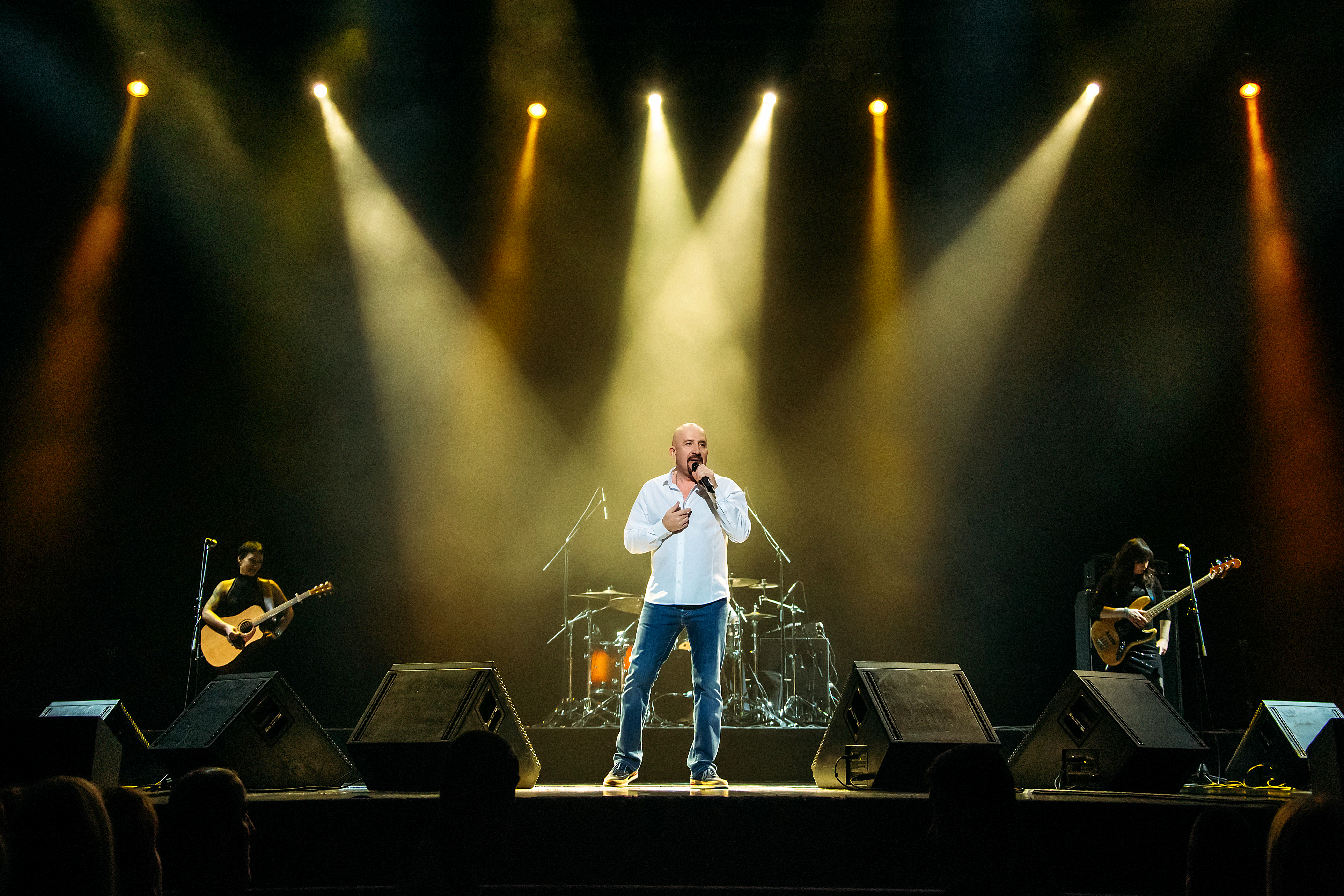 Евгений Григорьев, Санкт-Петербург, БКЗ "Октябрсьский", 16.01.16